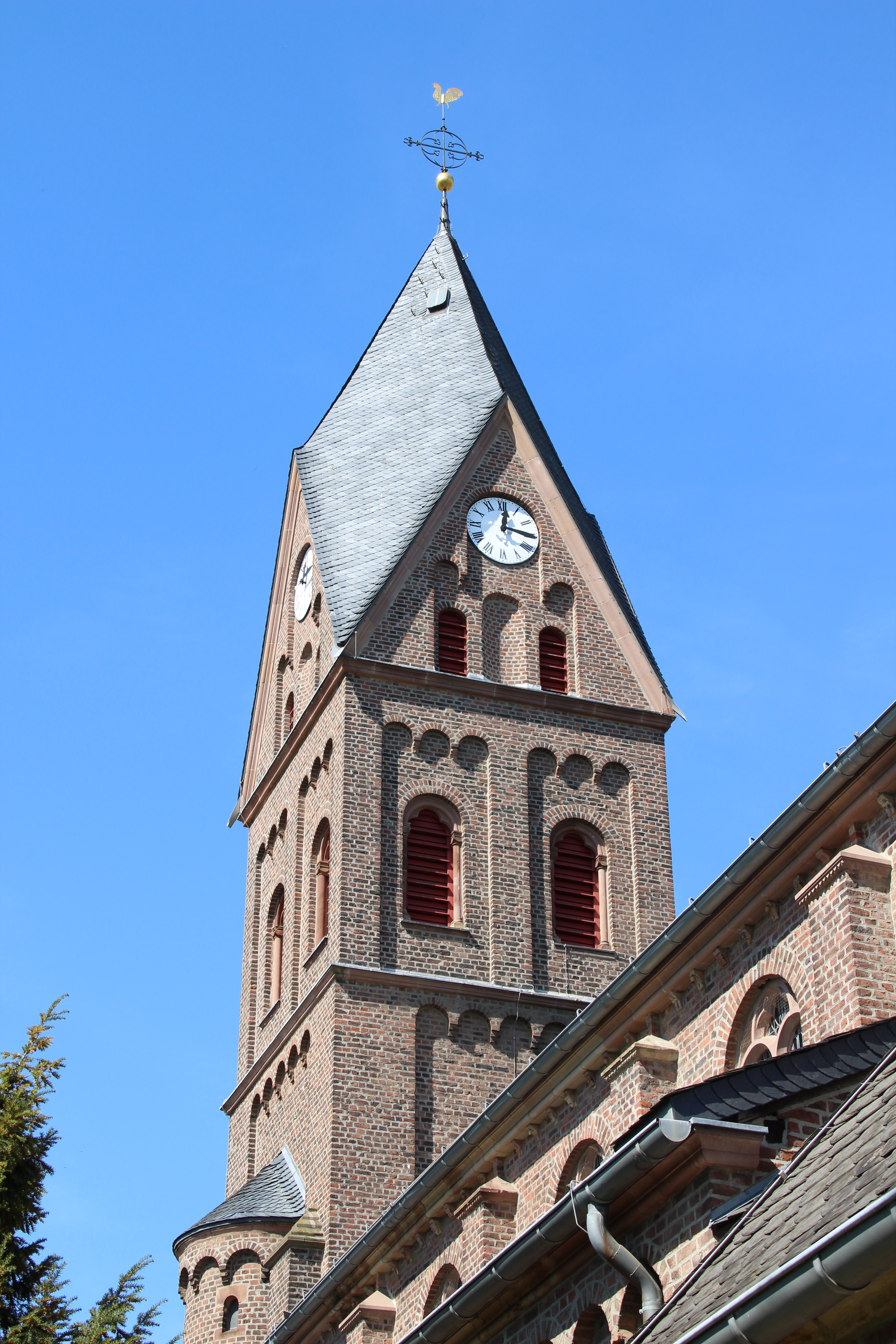 Kirchturm der Kath. Pfarrkirche St. Mariä Himmelfahrt in Mariaweiler.